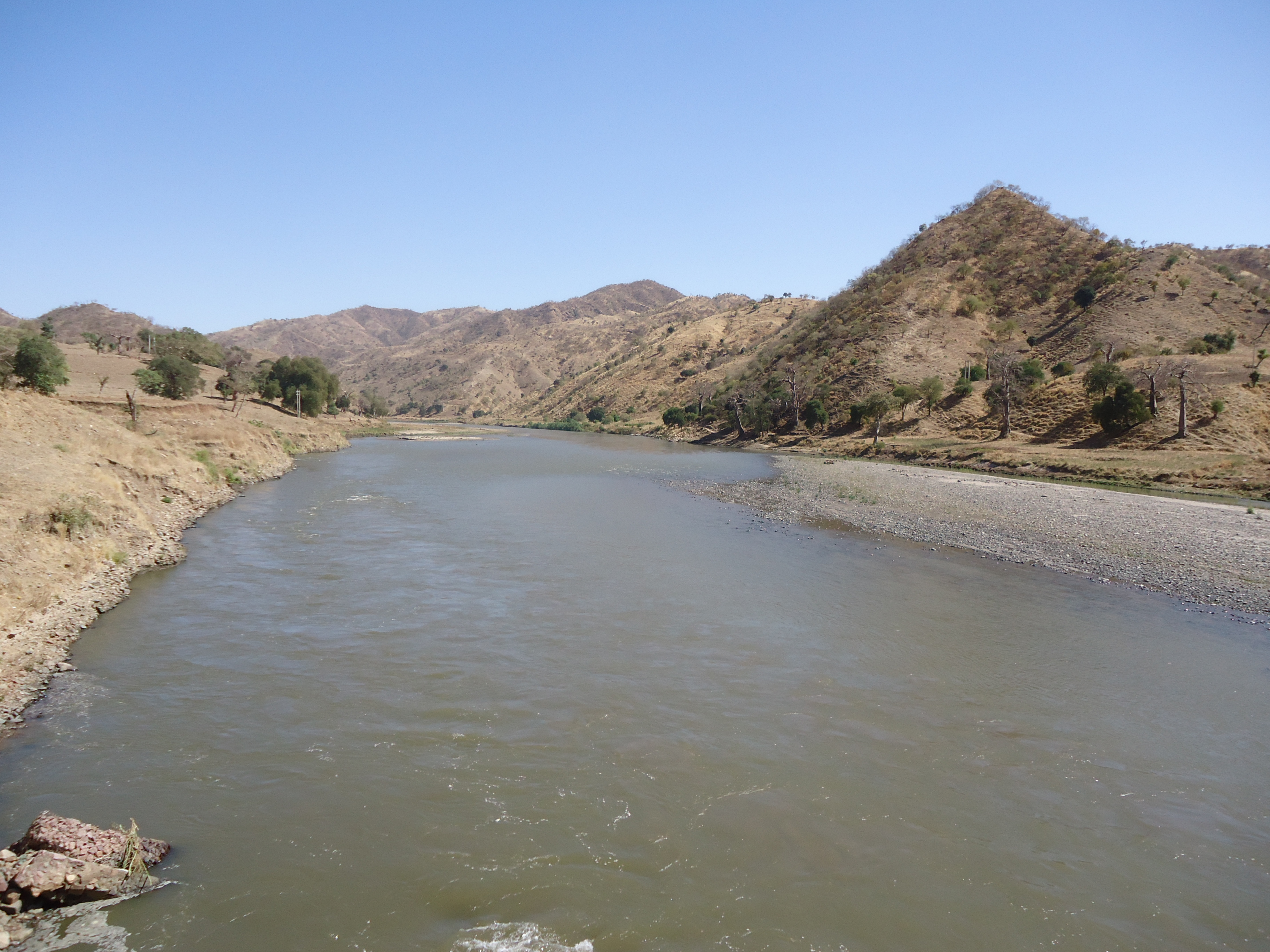 Von der Brücke aus, über die die Nationalstraße 3 zwischen Gonder und Aksum den Fluss überquert.